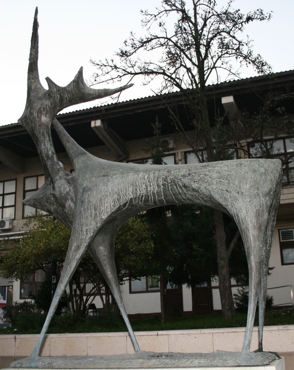 Jelen Dušana Džamonje pred SC-om u Zagrebu